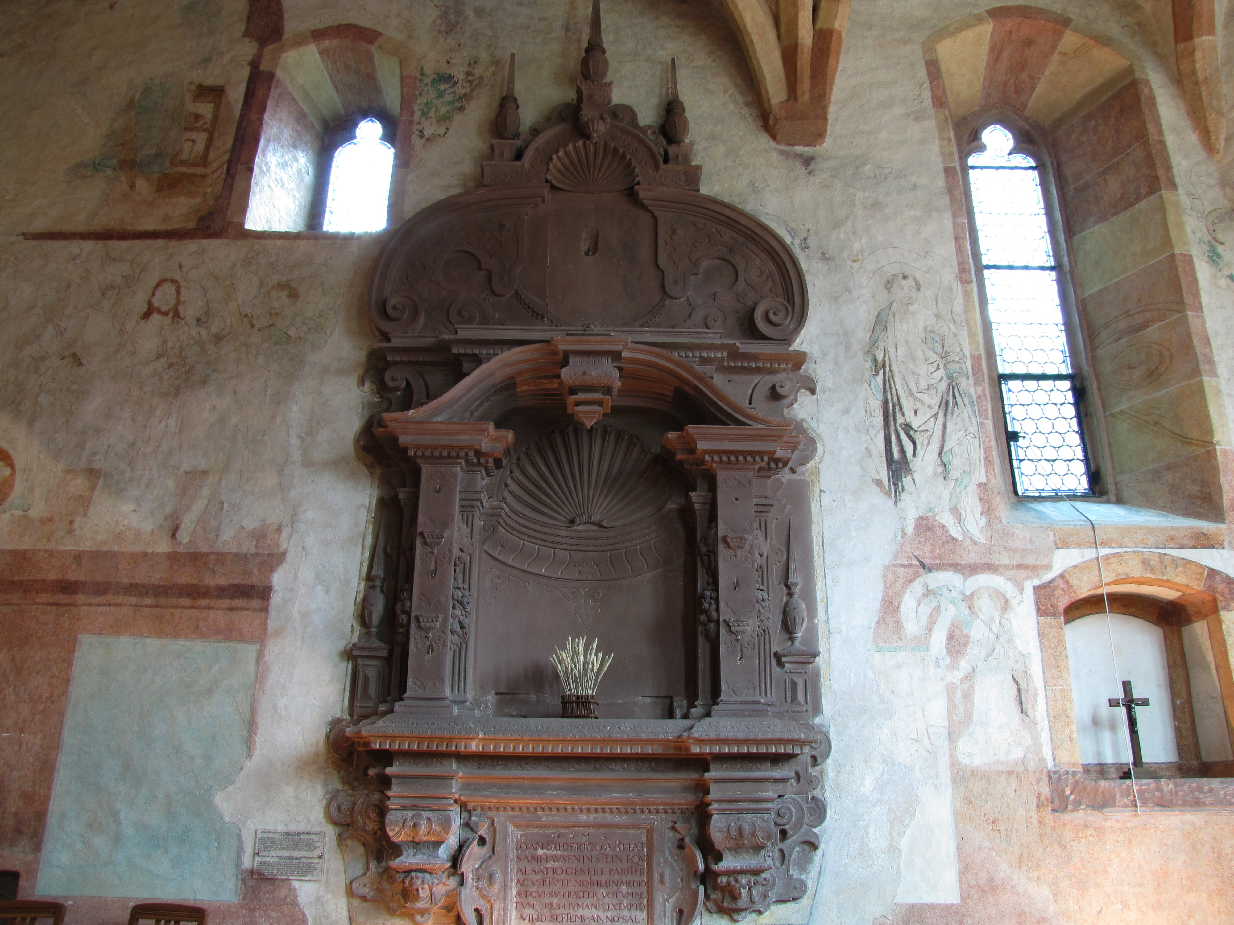 Alsace, Bas-Rhin, Baldenheim, Église protestante (PA00084595, IA67010725). Plaque funéraire de J.F. von Rathsamhausem zum Stein (XVIe)